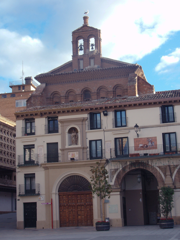 Parroquia de Santa María de Gracia situada en Plaza Nueva (Tudela), en 2010